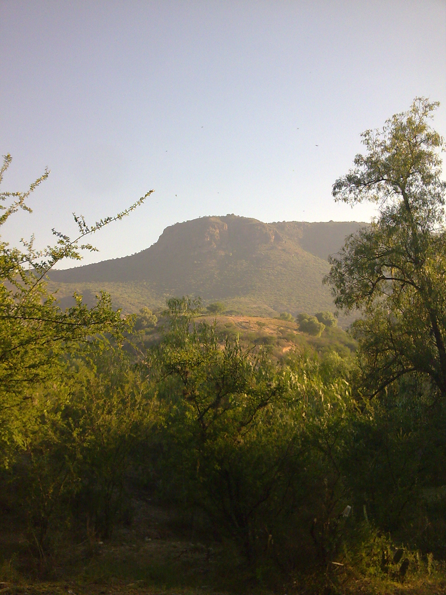 "Elefante" Hill